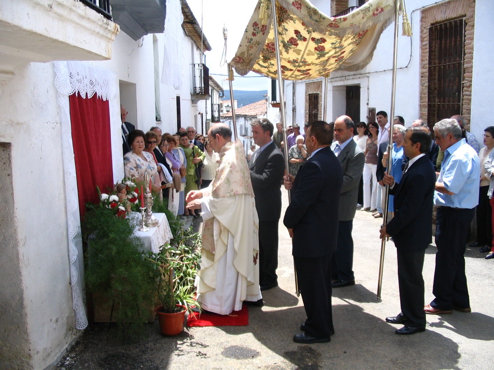 Procesión del día del Corpus en Navahermosa (Huelva)